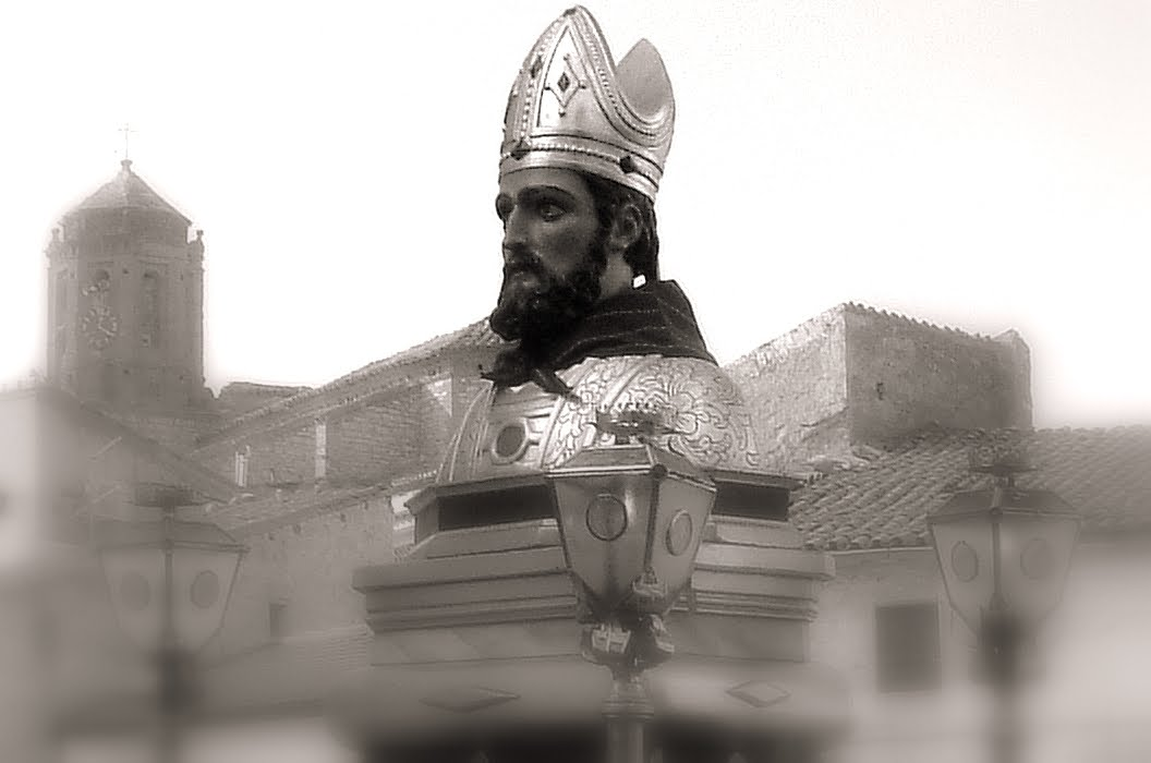 Buto de San Valero en procesión por las calles de Castelnou